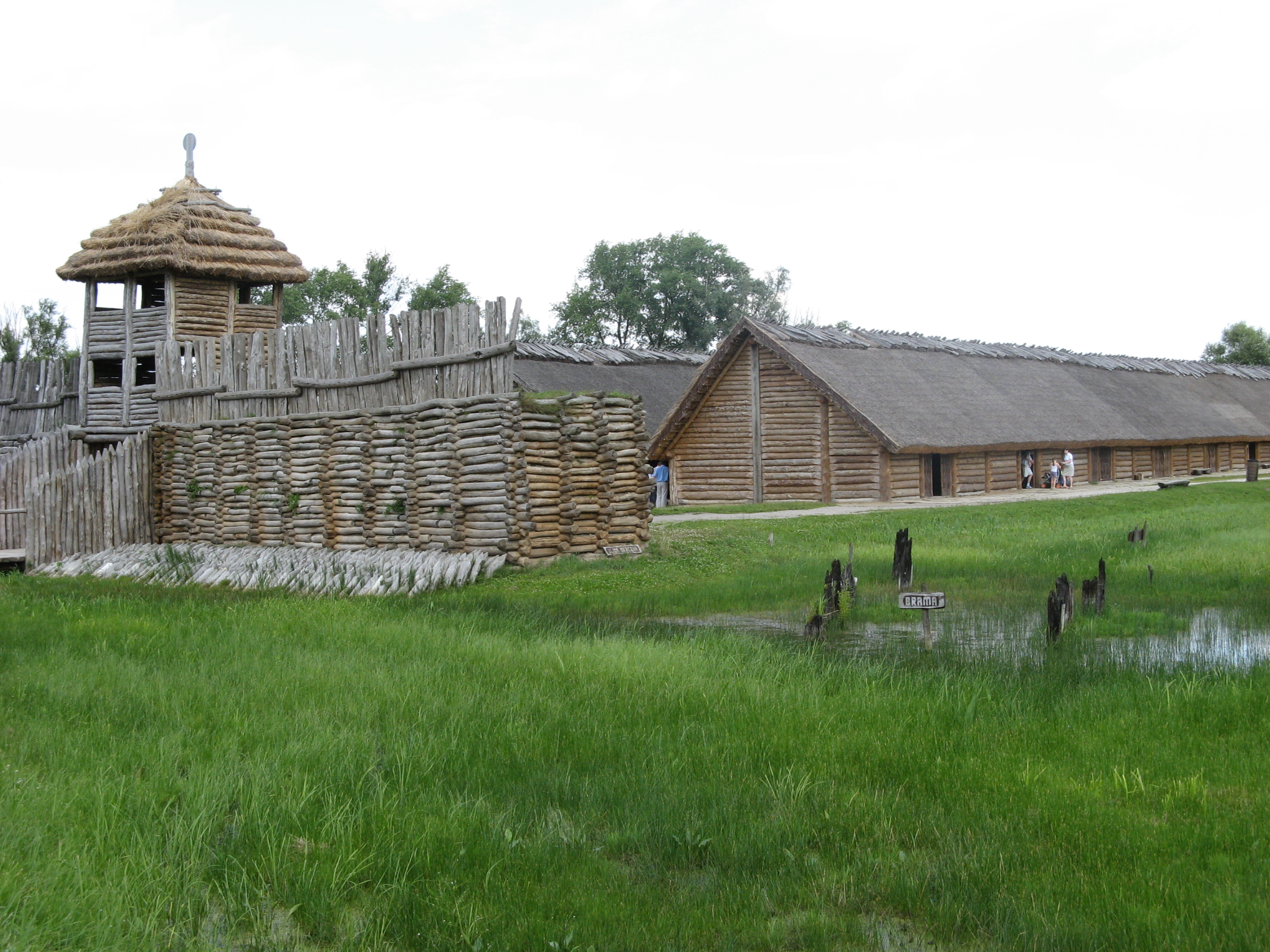 Biskupin - archeopark, rekonstrukce osady z doby bronzové. Brána od vnější strany a jedna ze svou rekonstruovaných chat.